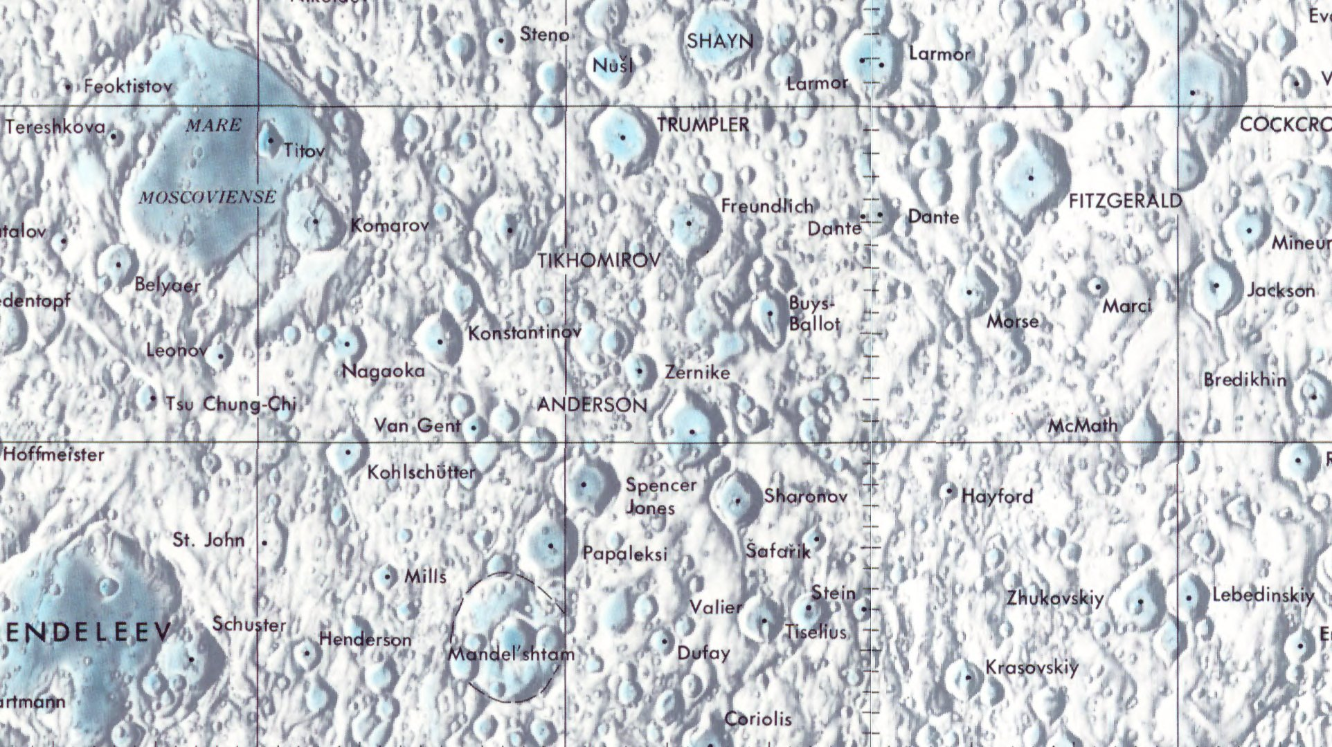 Cráter lunar Spencer Jones. Localización. (Lunar Chart LPC1. Second Edition)